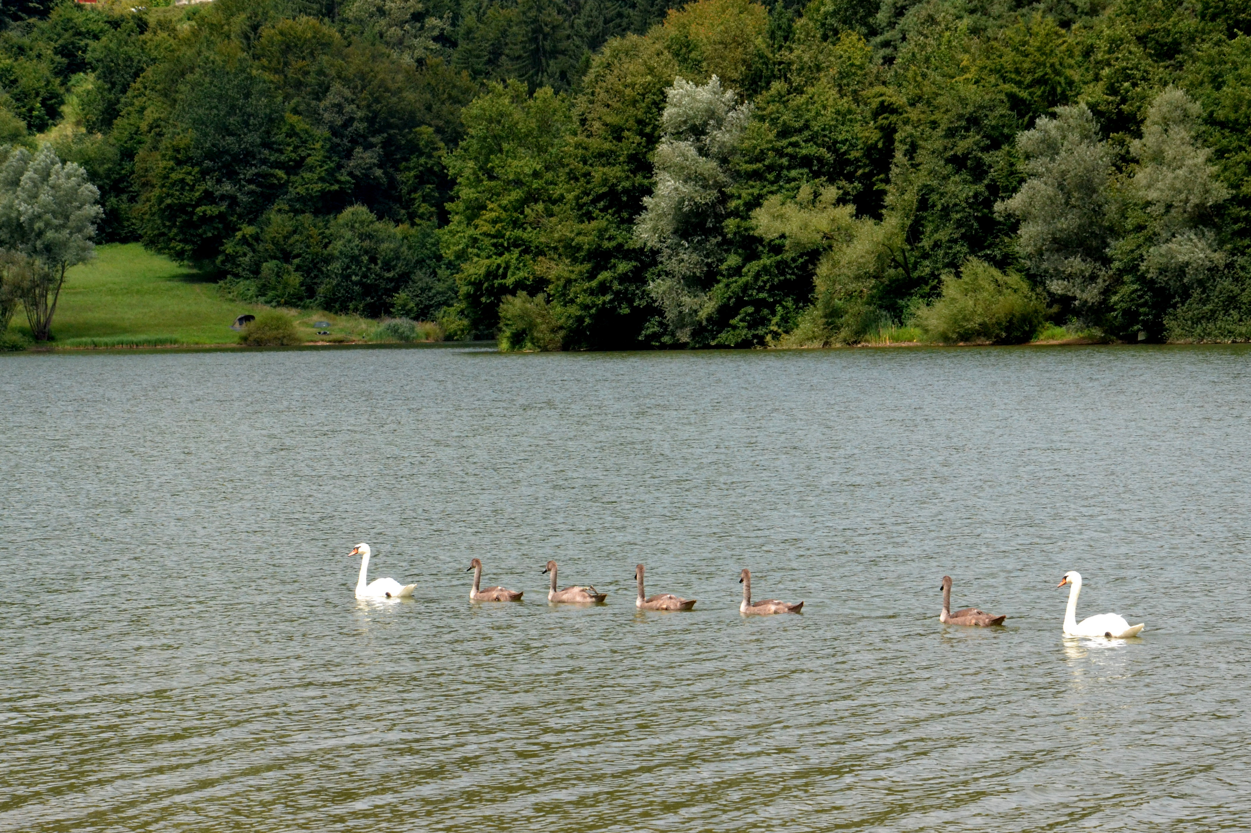 Labodja družina na Slivniškem jezeru.